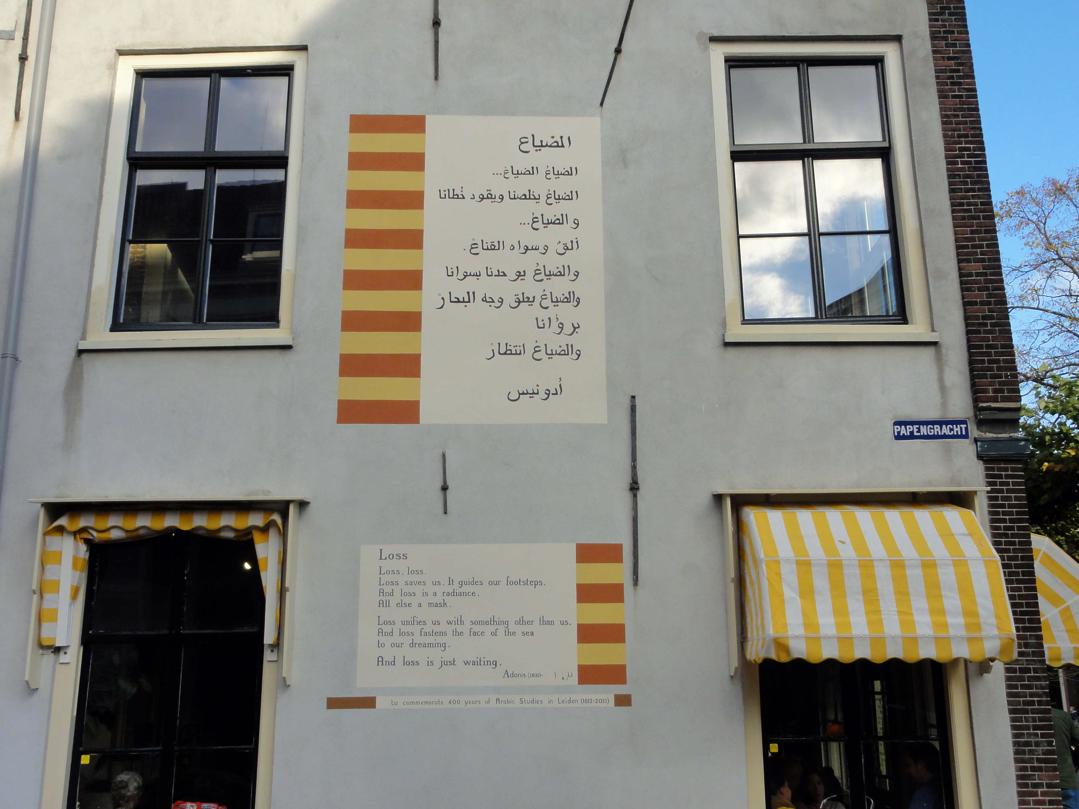 Adonis - Dayâ (Dat wat verloren gaat). Arabisch muurgedicht aan de Papengracht 40. Aangebracht in 2013.